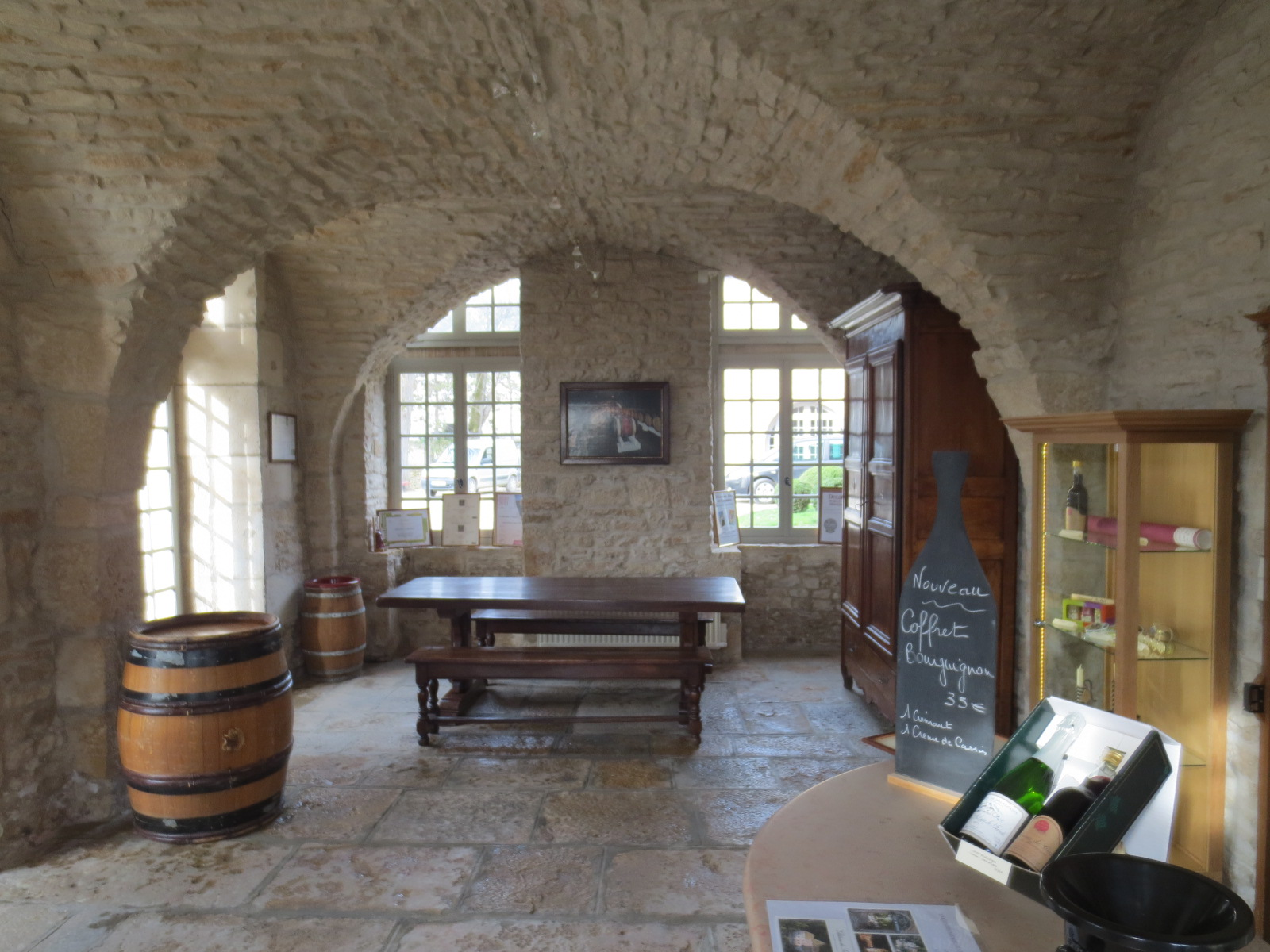 Château de Santenay